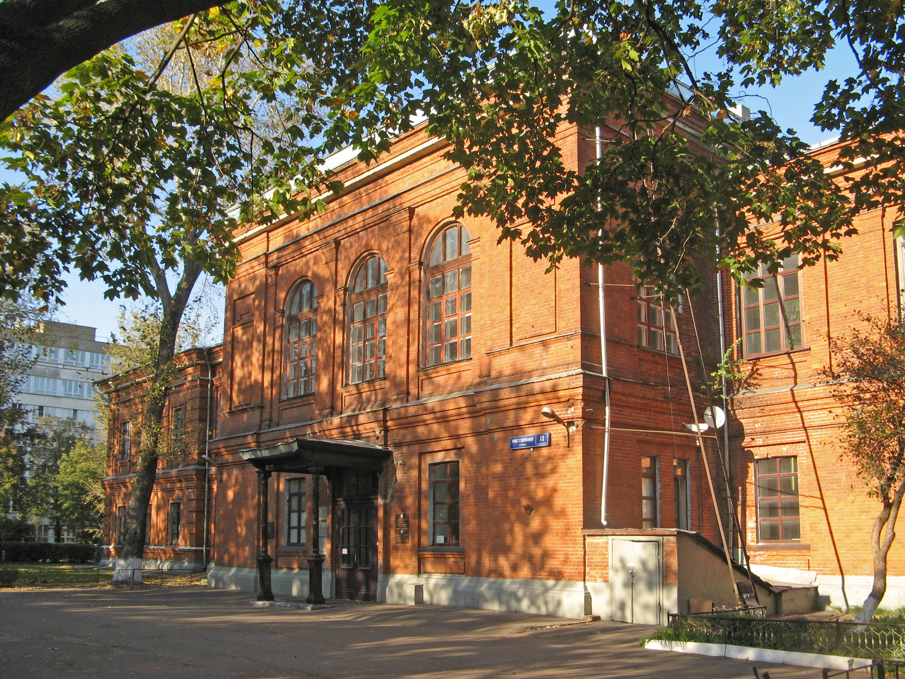 Здание психиатрической клиники им. С.С.Корсакова, в которой в разные годы работали выдающиеся врачи-психиатры: В.П.Сербский, П.Б.Ганнушкин, С.А.Суханов и др.: Россолимо ул., дом 11, строение 9, Хамовники, Центральный округ, Москва